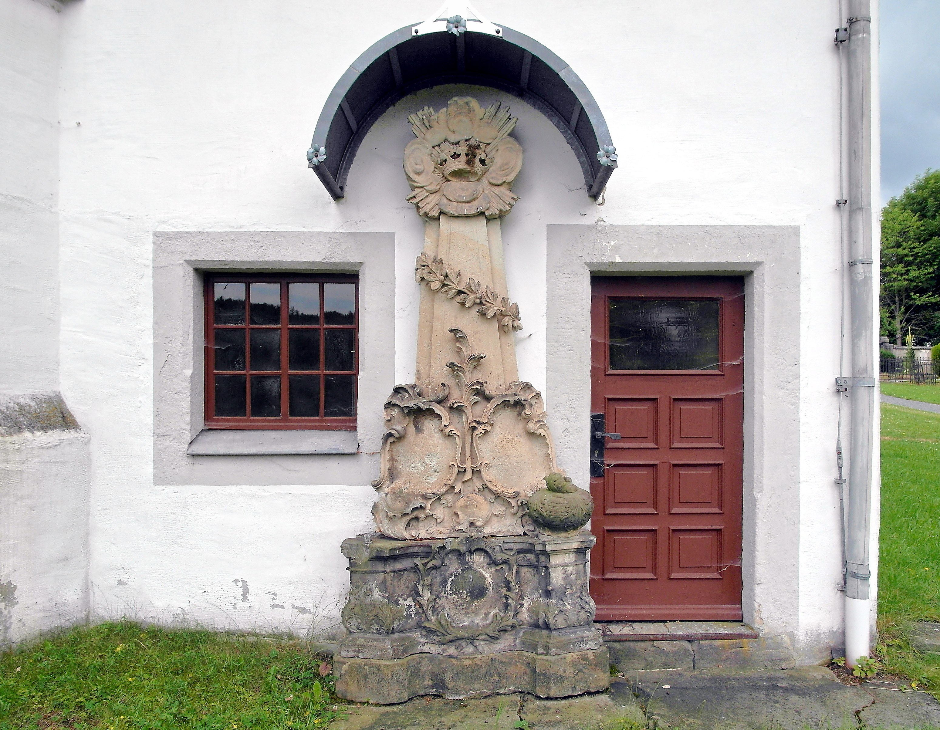 01.07.2014 01774 Höckendorf (Klingenberg): Dorfkirche, Kirchweg 1 (GMP: 50.926062,13.587406). Romanische Kirche in Höckendorf, um 1325 erbaut (einschließlich Nachbargebäude auf den Grundmauern der ehemaligen Burg bzw. des Rittergutes der Ritter von Theler) am Heiligen Weg. Der Rundbogenfries an den Außenwänden stammt aus der Romanik. Hier ein Epitaph an der Nordost-Außenwand. [SAM4909.JPG]20140701075DR.JPG(c)Blobelt